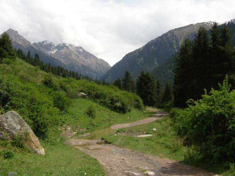 Karakol Canyon